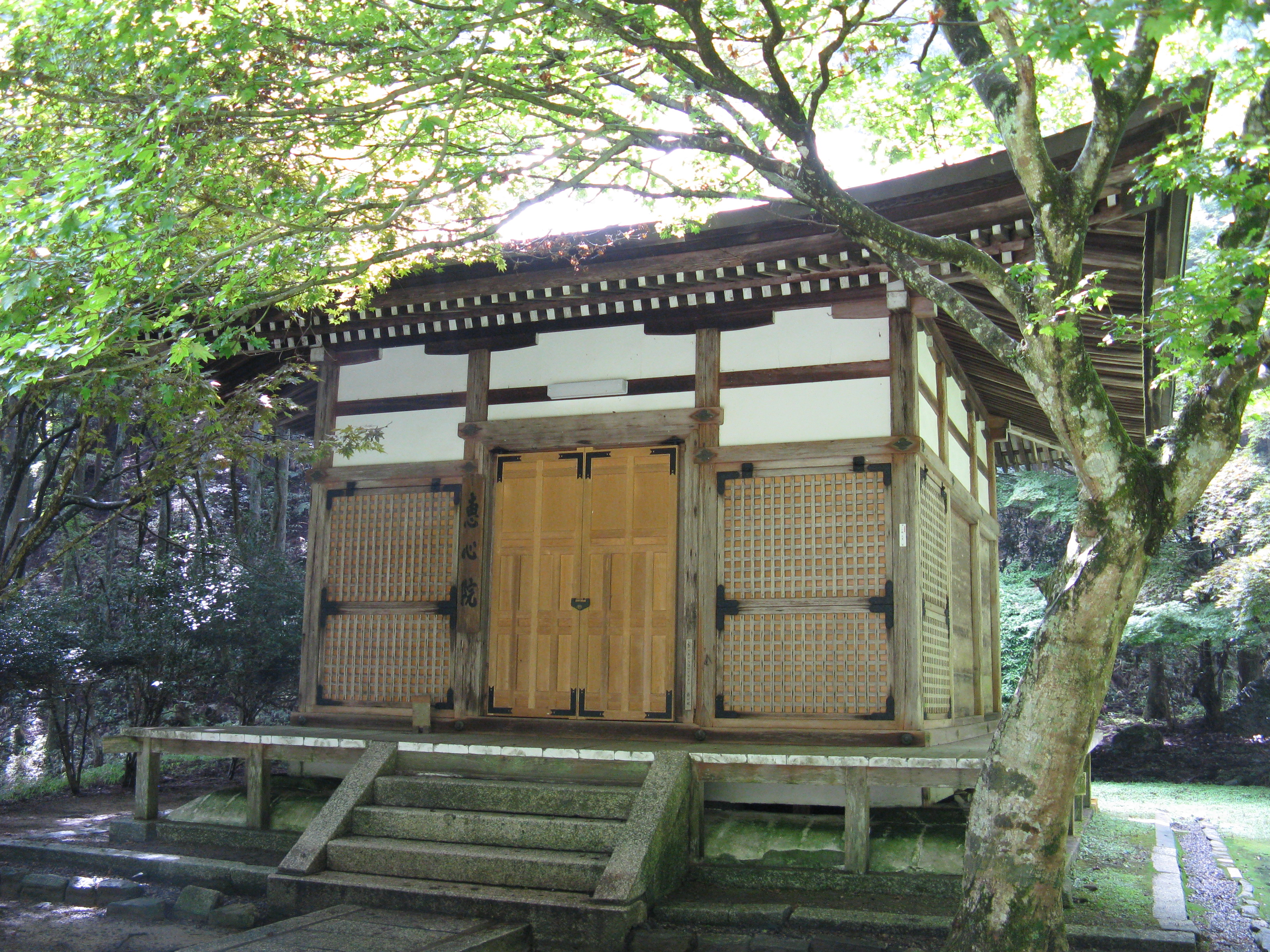 延暦寺 恵心院